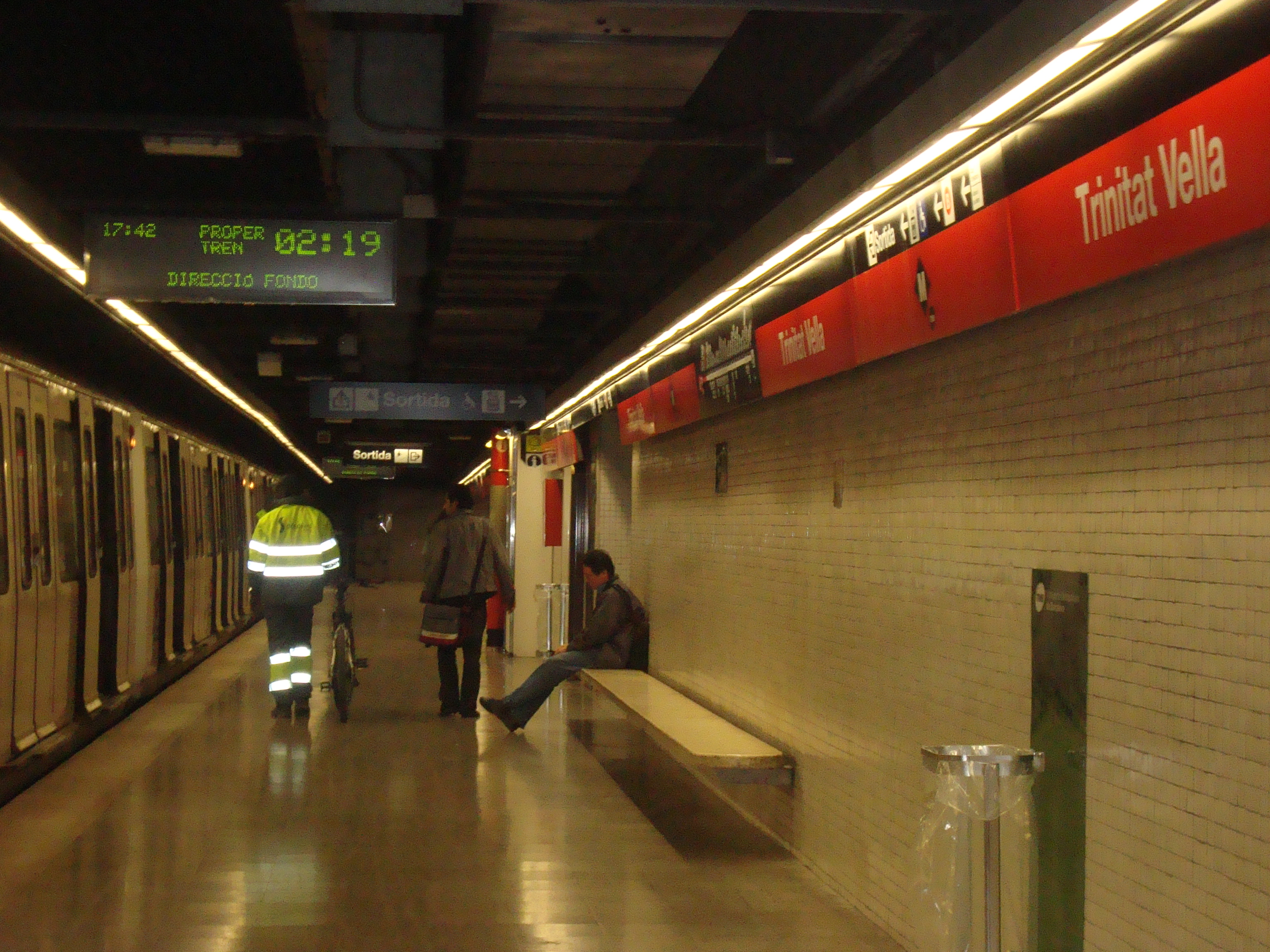 Estació de Trinitat Vella del metro de Barcelona.